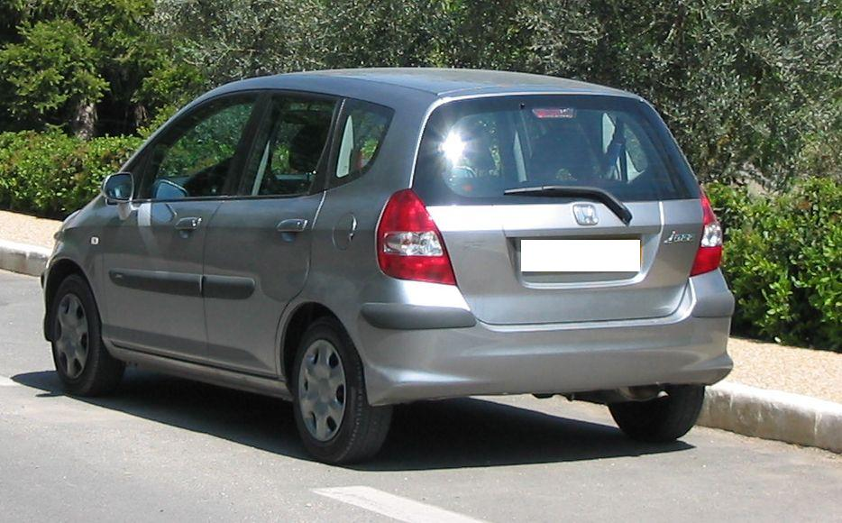 Honda Jazz